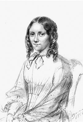 Jeanette Stjernström